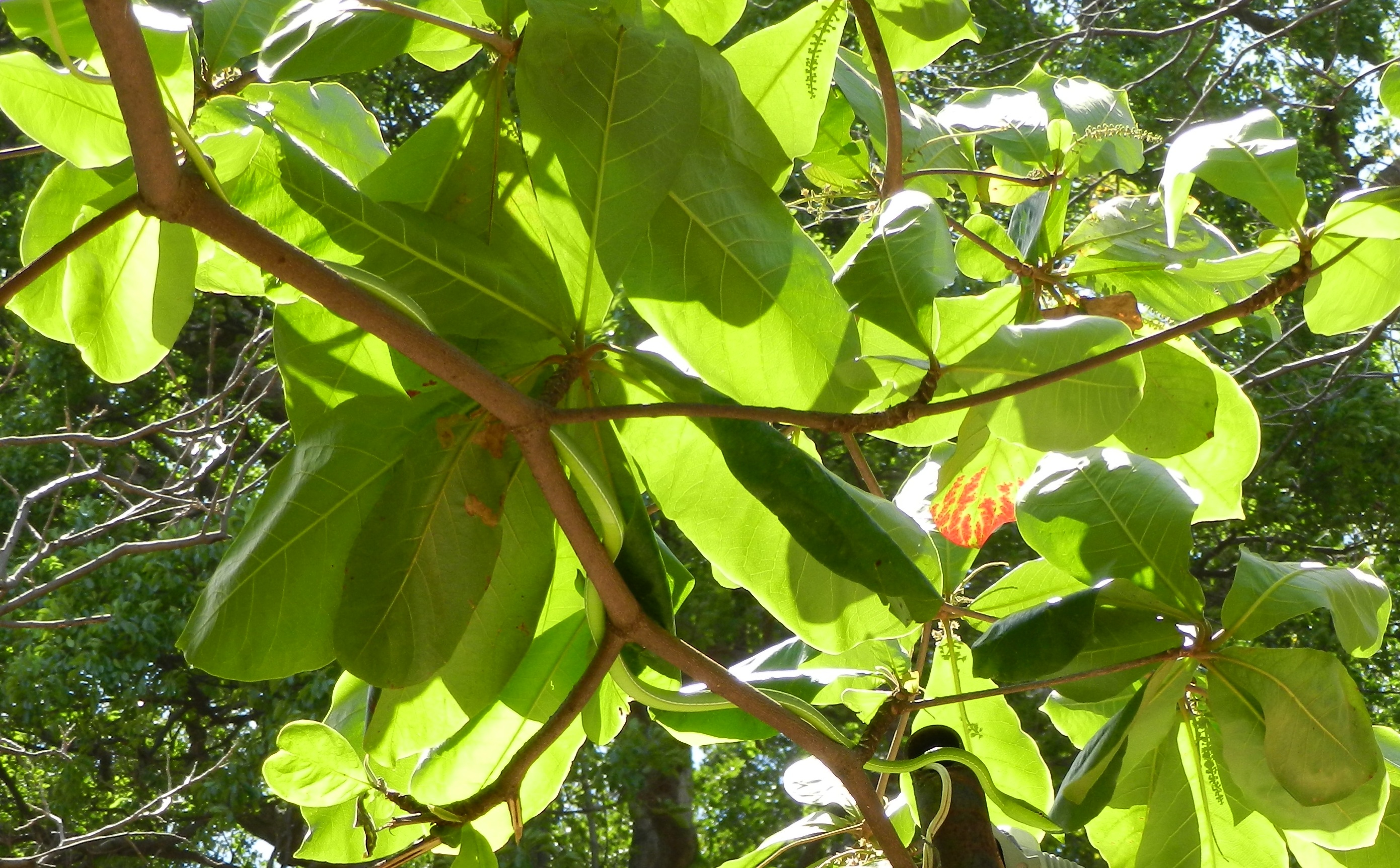 Culebra Chocoya sobre rama de almendro en El Crucero, Managua, Nicaragua.